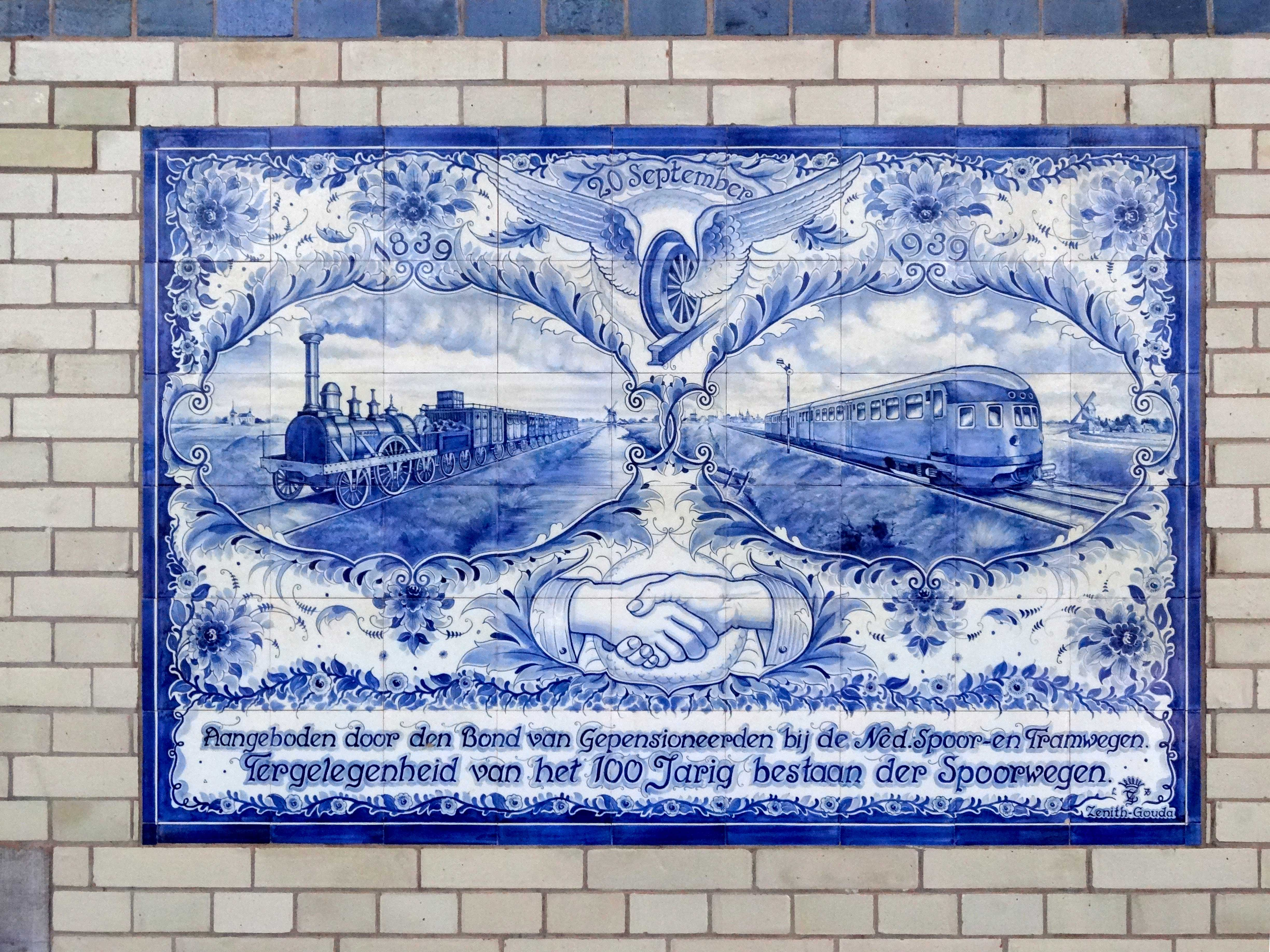 Tegeltableau Station Haarlem, gemaakt ter gelegenheid van het 100-jarig bestaan van de spoorwegen door Aart Stolk (1890-1969), plateelschilder bij Zenith in Gouda